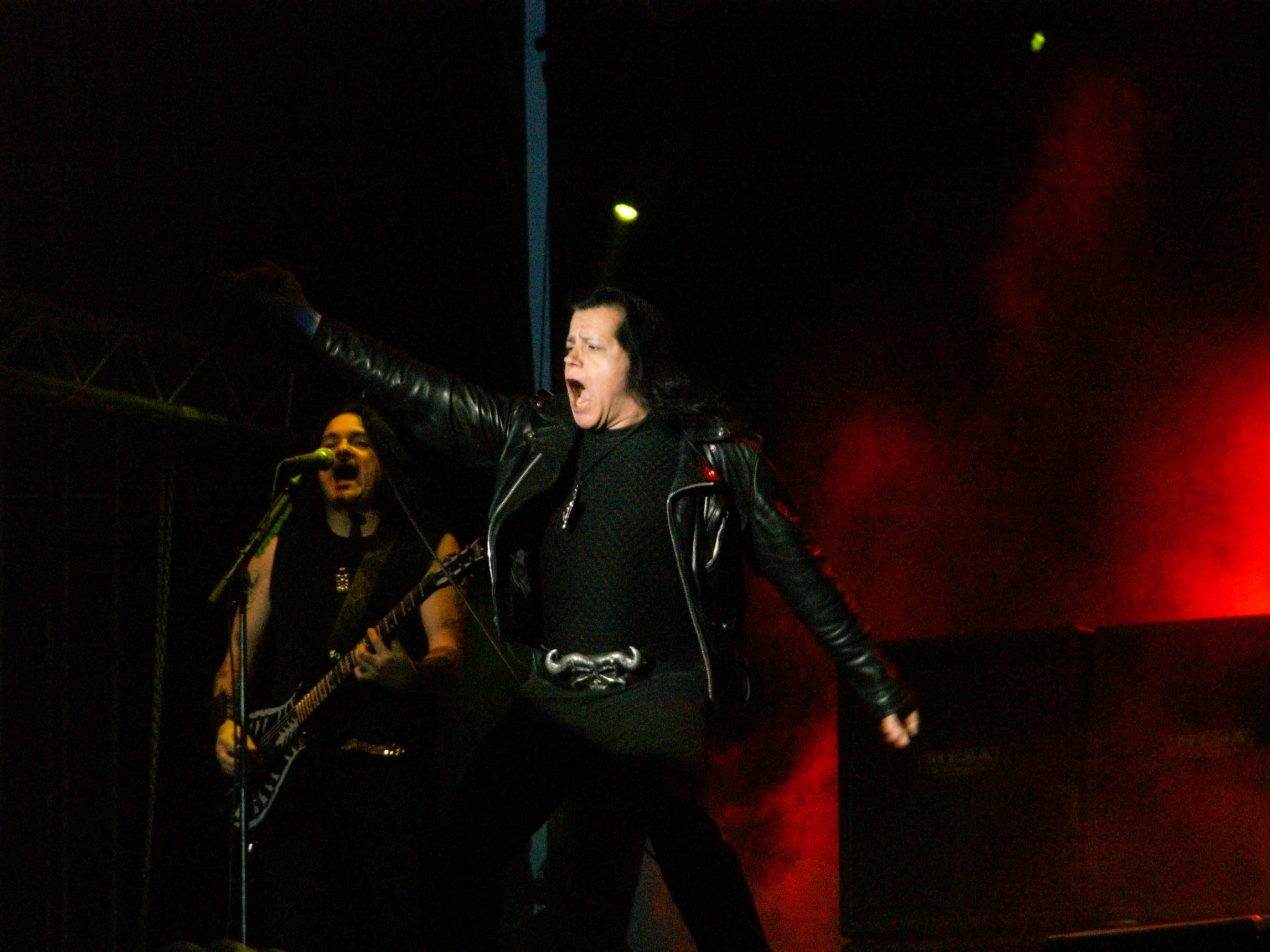 Danzig actuando en el Sweden Rock de 2010.